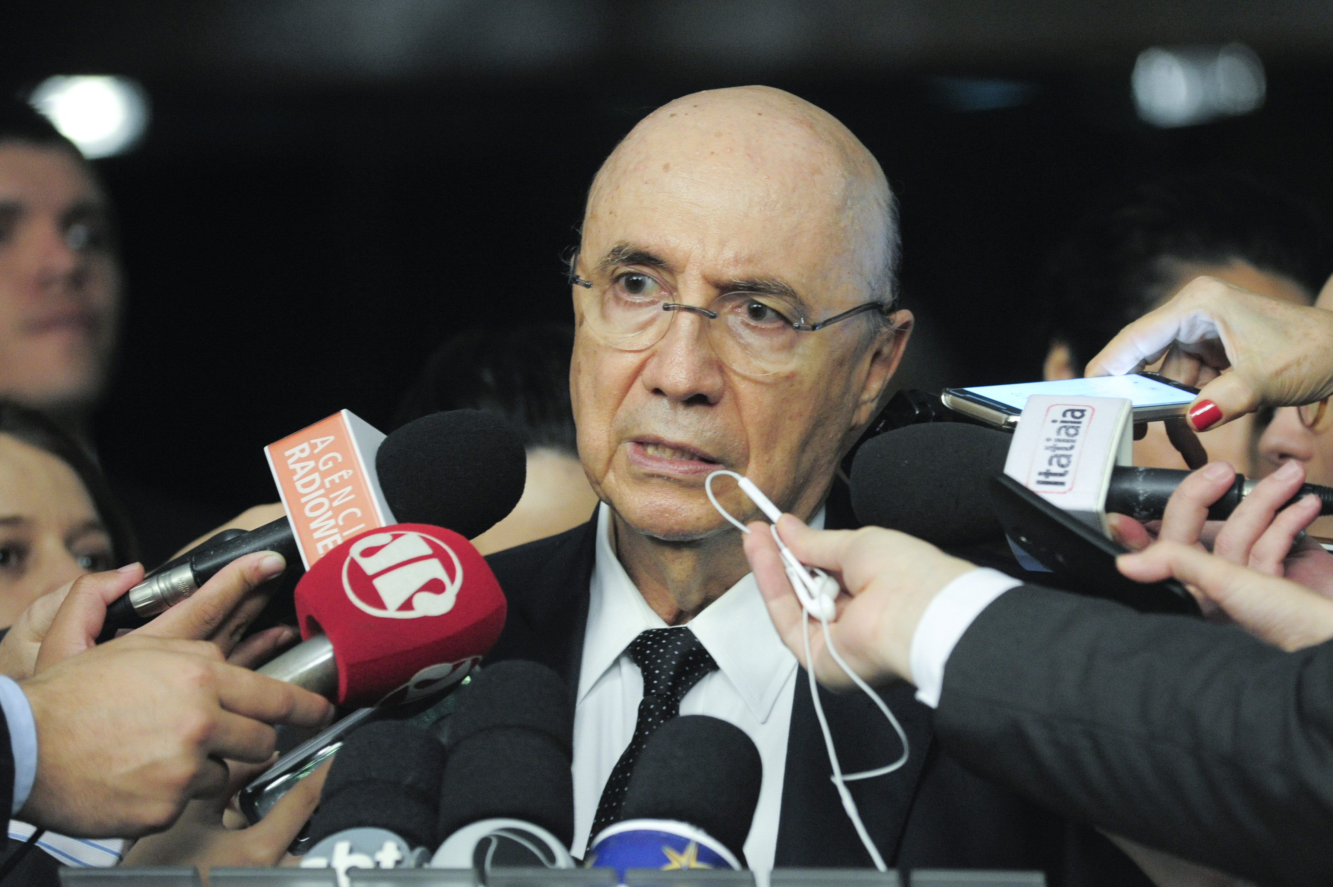 Ministro da Fazenda, Henrique Meirelles, concede entrevista. Foto: Geraldo Magela/Agência Senado